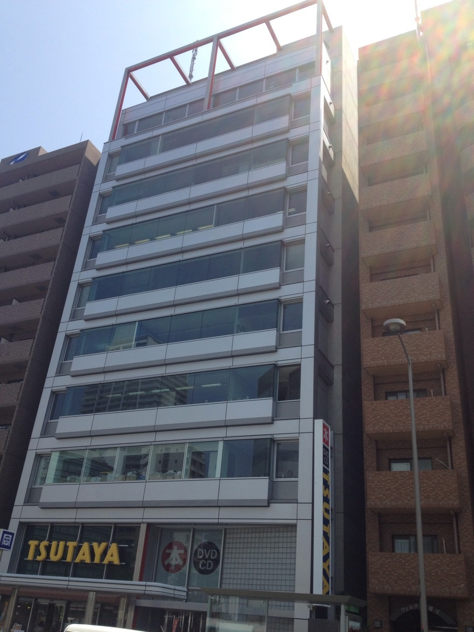 ENWA Company, Limited Building 本 社 ： 〒550-0014 大阪府大阪市西区北堀江2-1-11 久我ビル北館８Ｆ